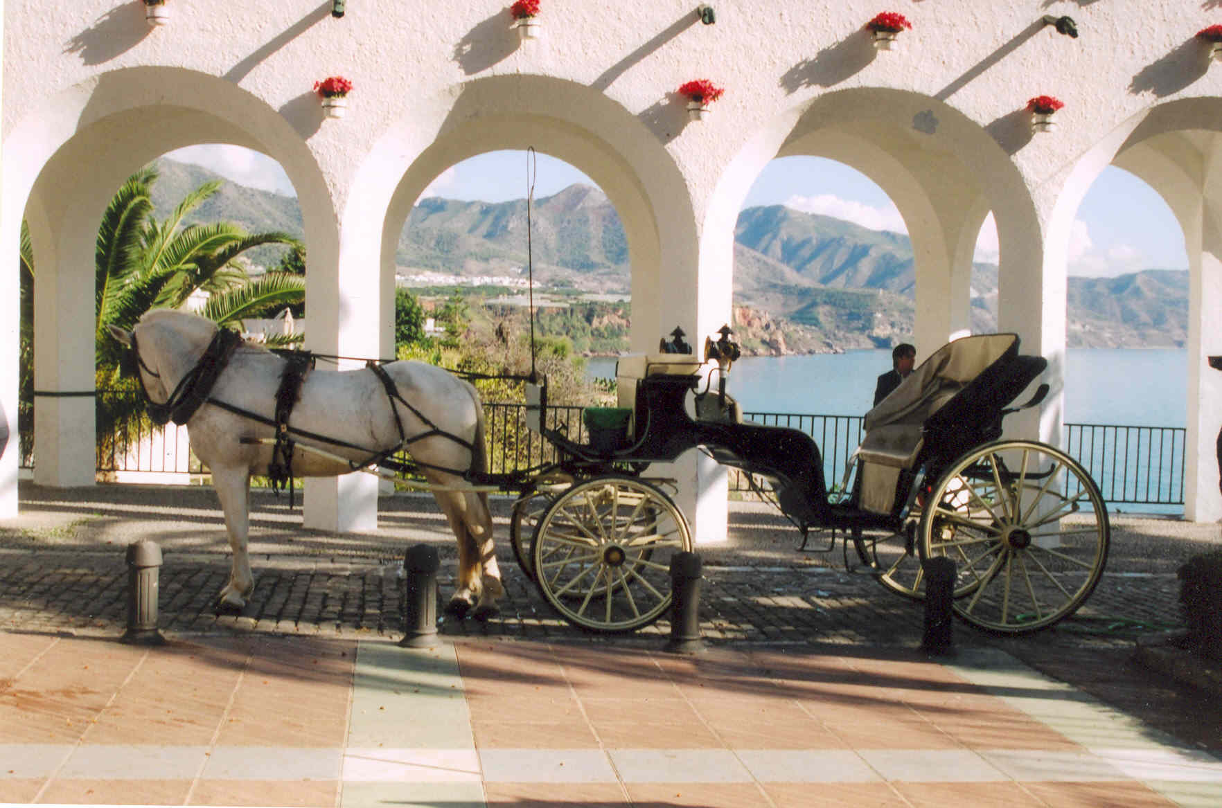 Balcón de Europa, een promenade in het centrum bovenop een klif in Nerja. Eigen foto december 2004